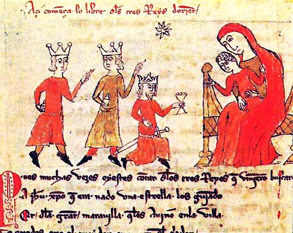 Inicio del "Libro de la infancia y muerte de Jesús" o "Libre dels tres reys d'orient"